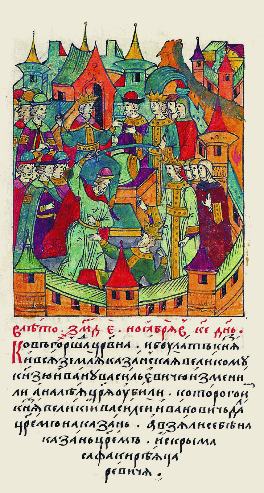 Миниатюра Лицевого летописного свода XVI в.: В 7044 году в ноябре в 25 день. Ковгоршад царевна и Булат-князь, и вся земля Казанская великому князю Ивану Васильевичу измени- ли: царя Яналея убили, которого им князь великий Василий Ива- нович дал царем на Казань, а взяли себе на Казань царем из Крыма царевича Сафа- Гирея».